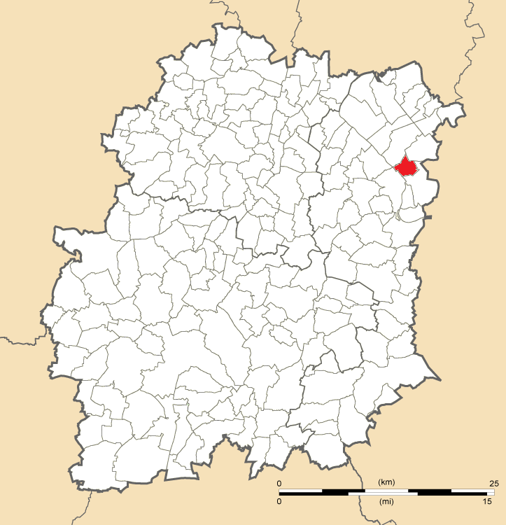 Carte de position de Saint-Germain-lès-Corbeil en Essonne (91)